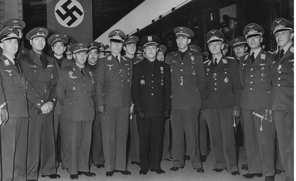 El embajador español en Berlín, José Finat, junto a oficiales alemanes y españoles, con motivo del envío al Frente ruso de la Escuadrilla «azul». Al frente de la misión militar española está el oficial Ángel Salas Larrazábal, situado a la derecha de José Finat.